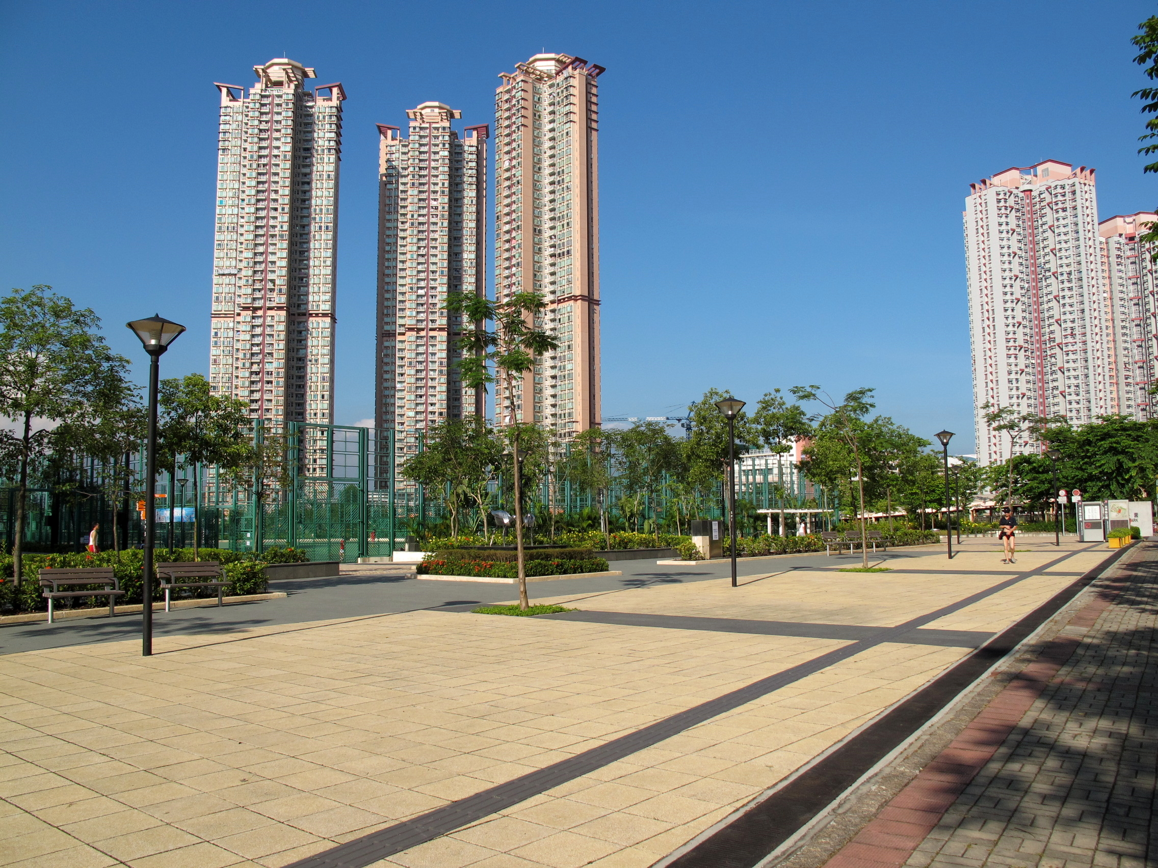 Tin Sau Road Park 天秀路公園